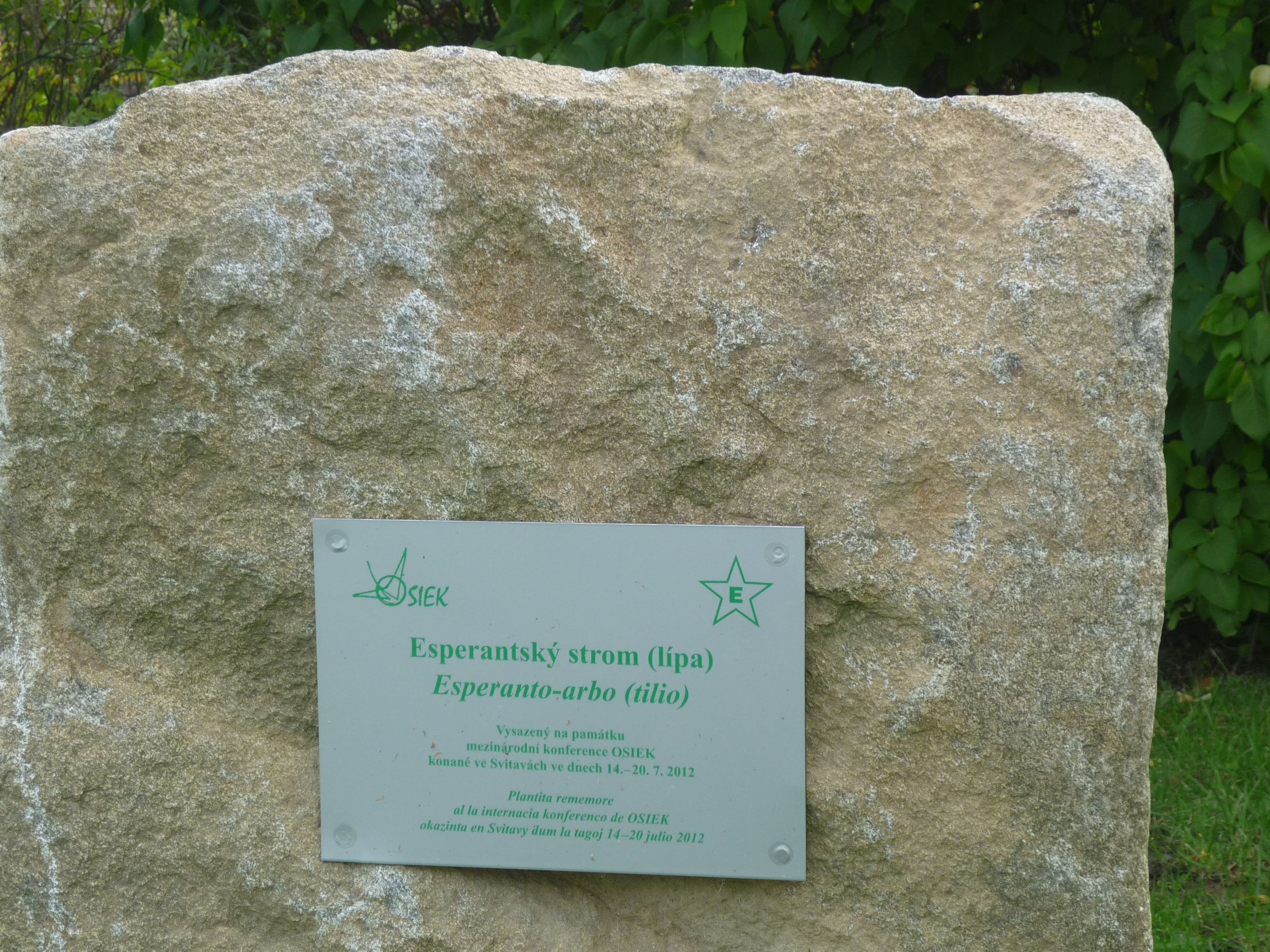 Memorŝtono de esperanto en Svitavy (apud esperanto-arbo)